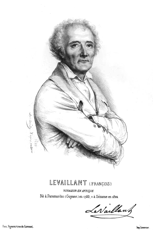 Portrait of François Levaillant